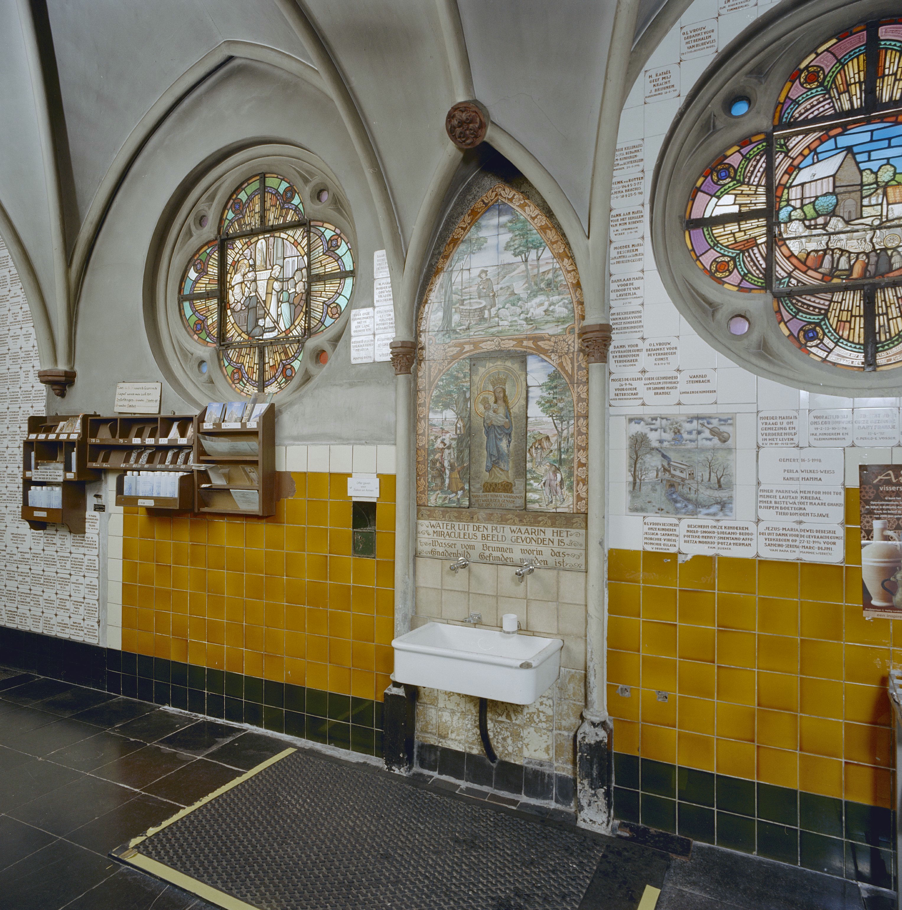 Kruiswegpark: Interieur, gang met tappunt, water uit wonderdoende bron